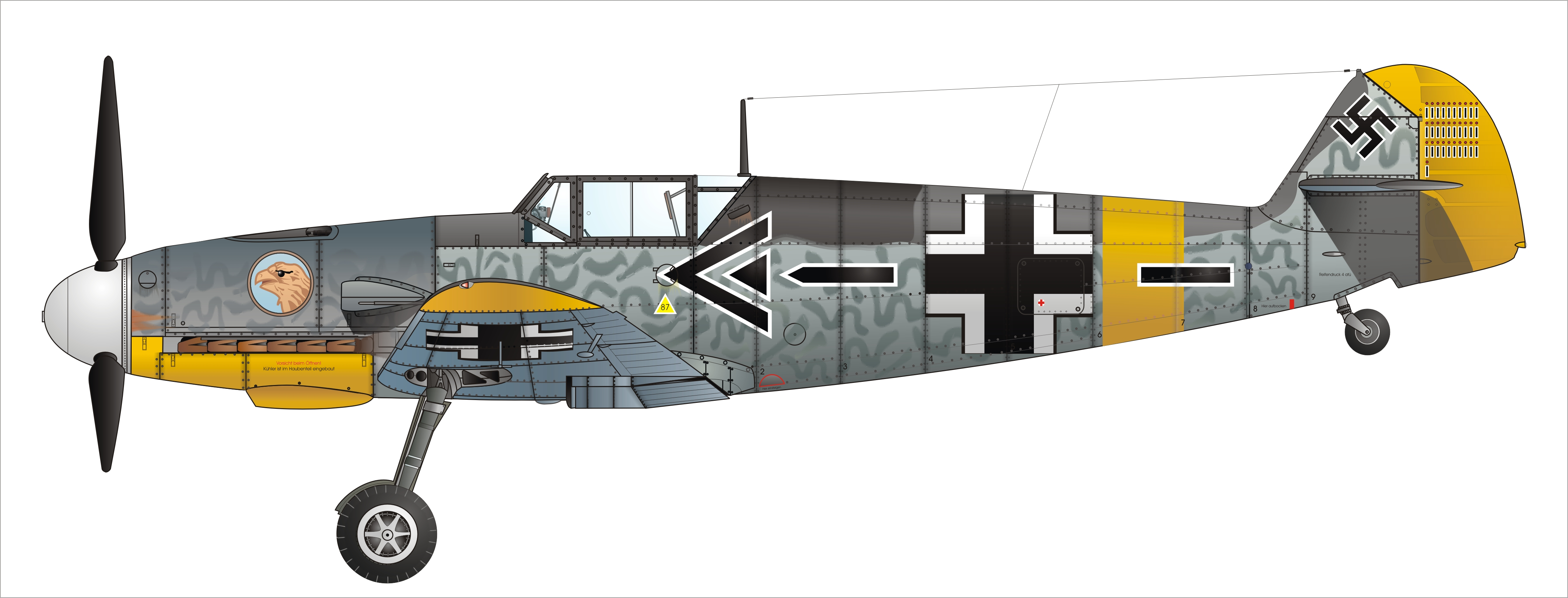 Bf 109 F-2, Stab/JG 51, Werner "Vati" Mölders